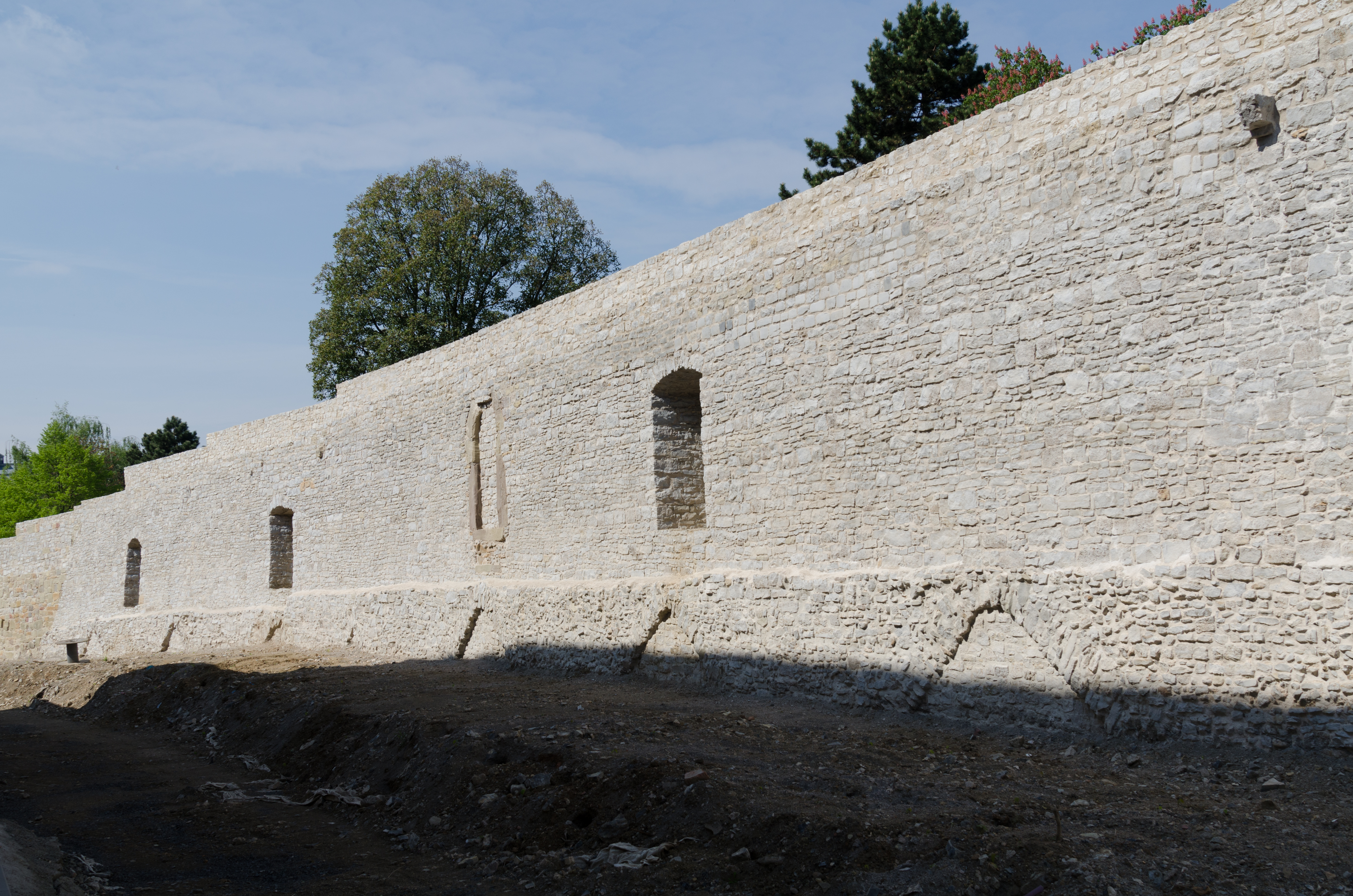 Schweinfurt, Stadtmauer, Neutorstraße